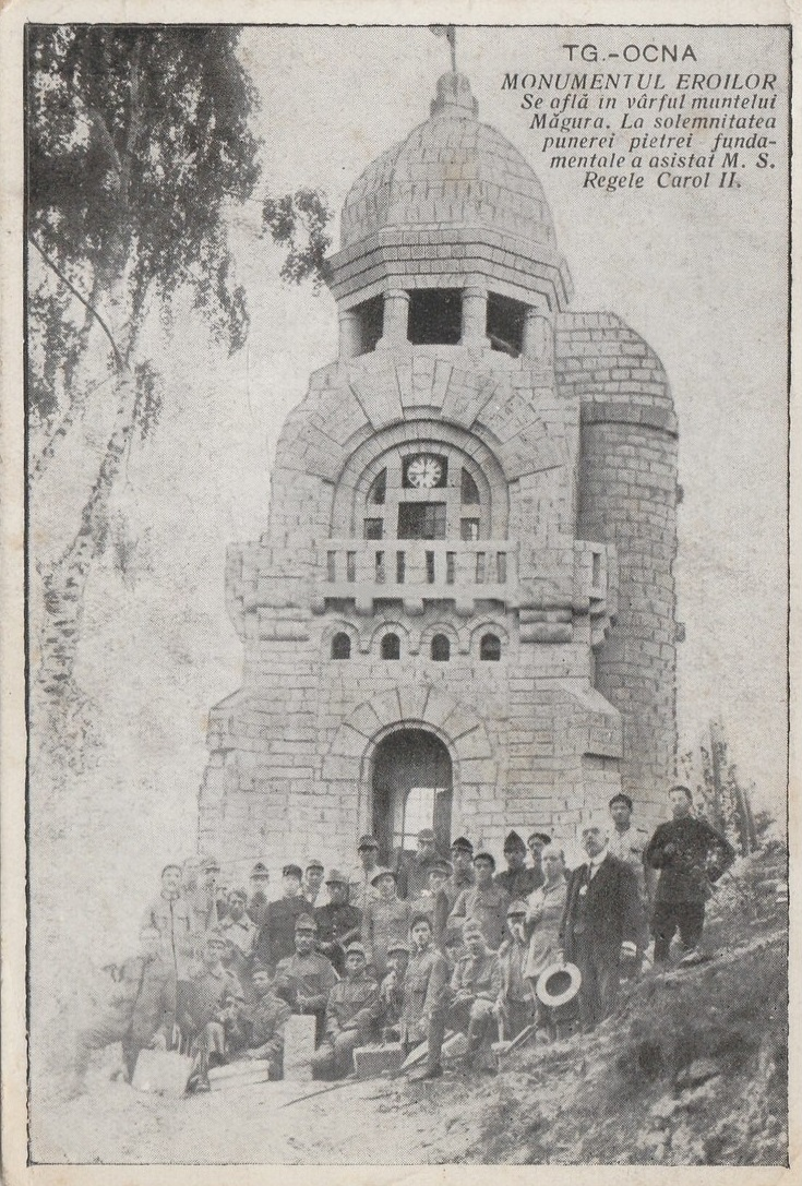 Monumentul Eroilor de pe Măgura Ocnei la inugurarea sa din 1928.